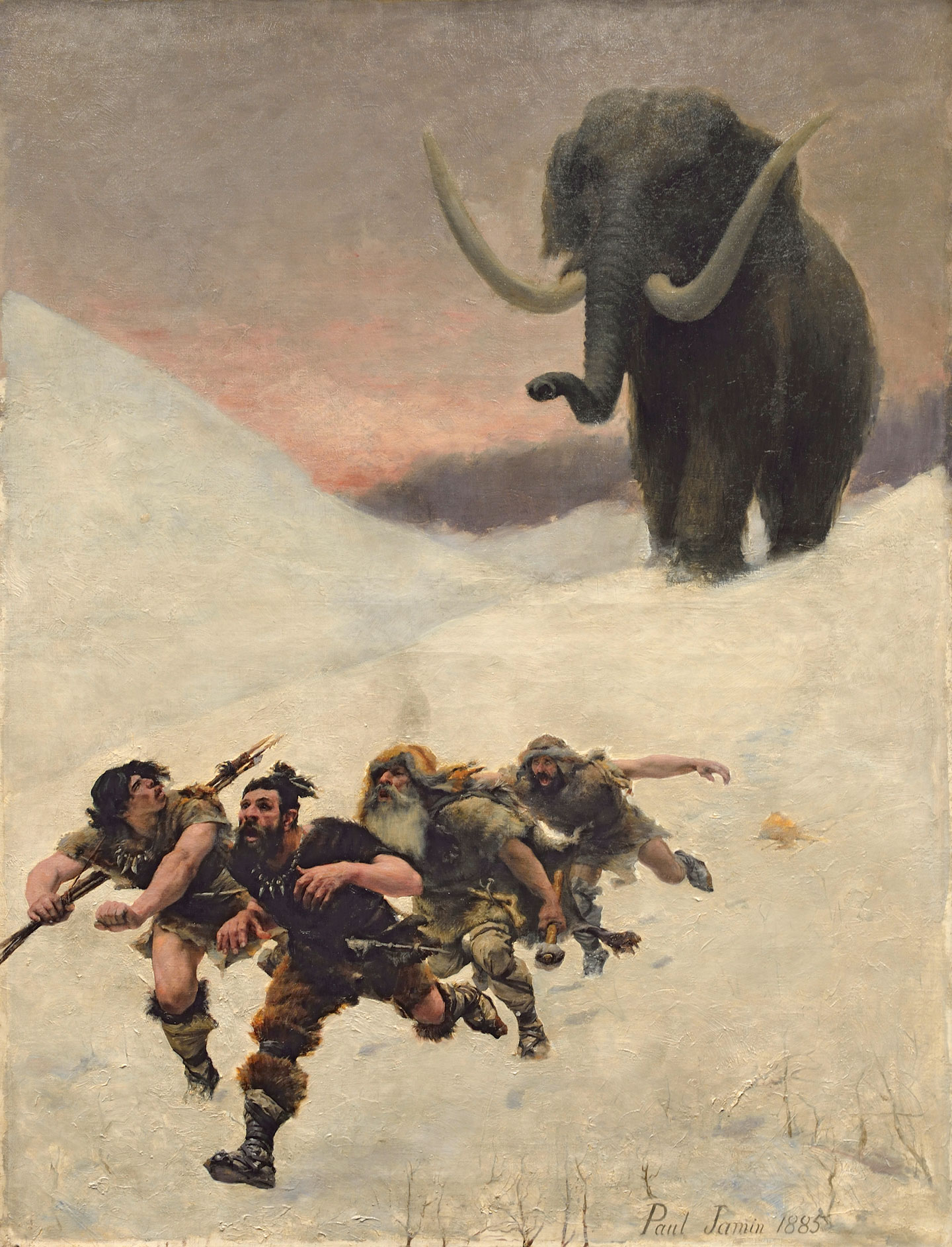 La fuite devant le mammouth